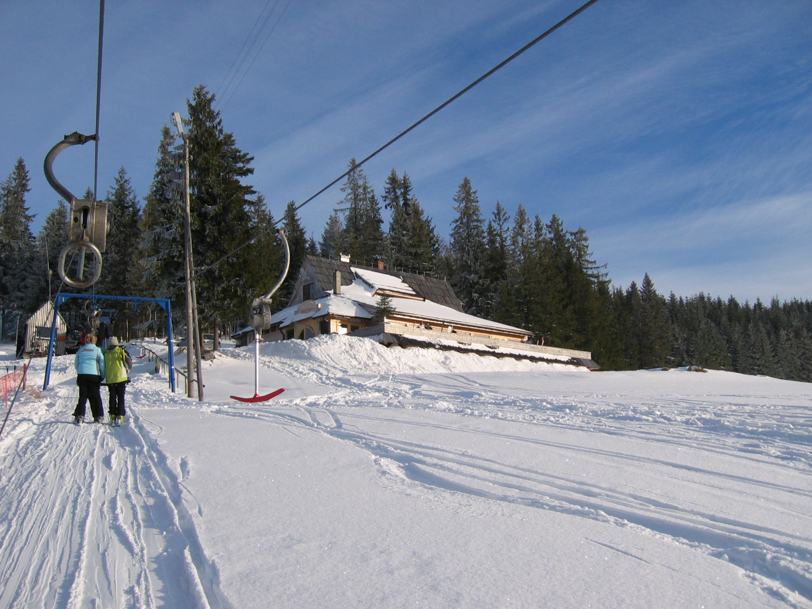 Bukowina Tatrzańska, Poland